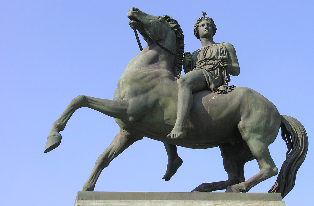 Statua di Polluce (Dioscuri), scolpita da Abbondio Sangiorgio, all'ingresso del Palazzo Reale di Torino.